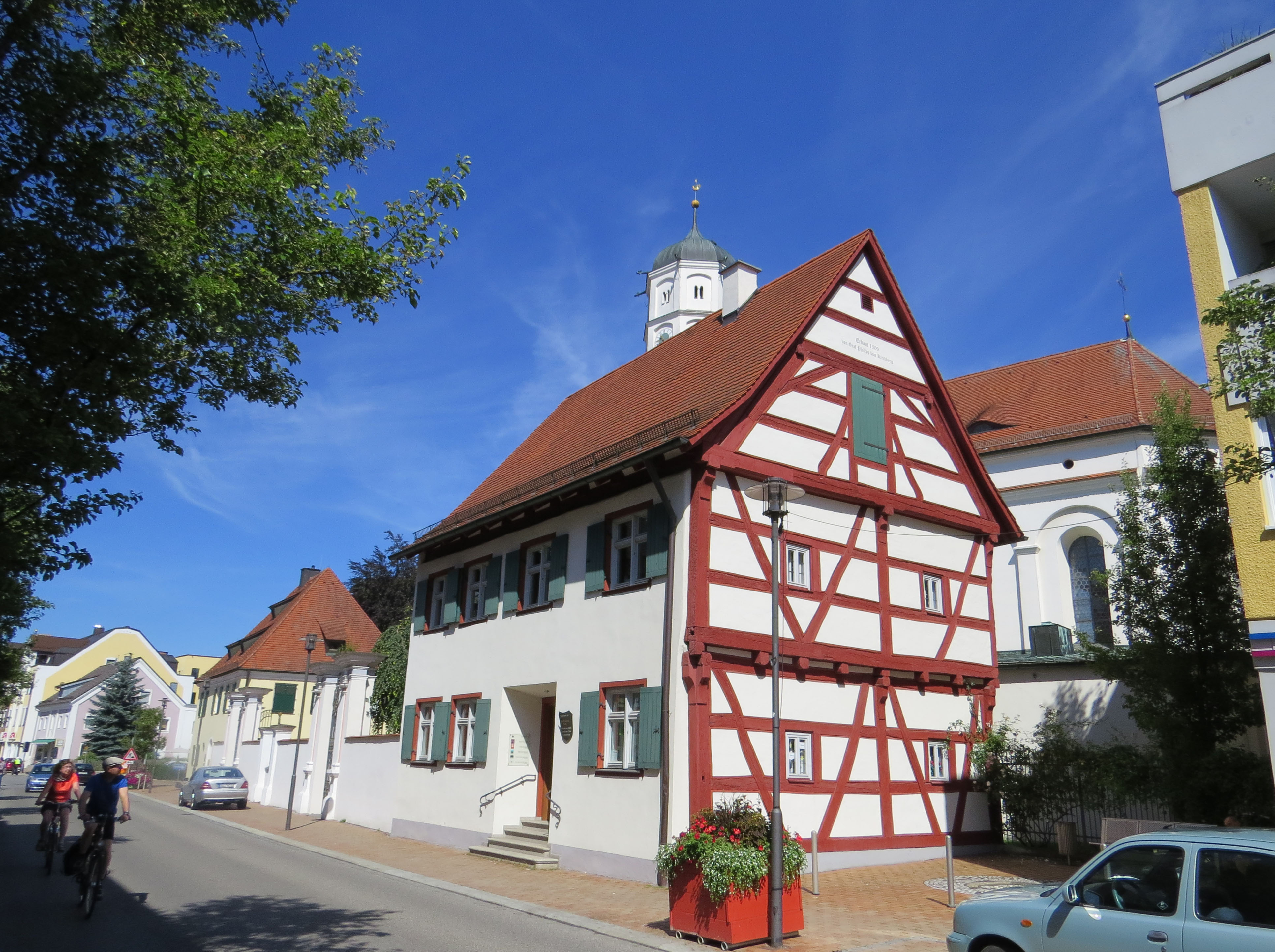 Ehem. Benefiziatenhaus in Illertissen